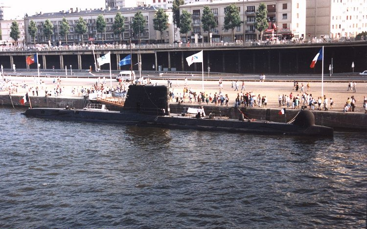 Sous-marin français Psyché en escale à Rouen en juillet 1994 à l'occasion de la manifestation "Armada de la liberté" Original caption: “ Photo © Guillaume Rueda”